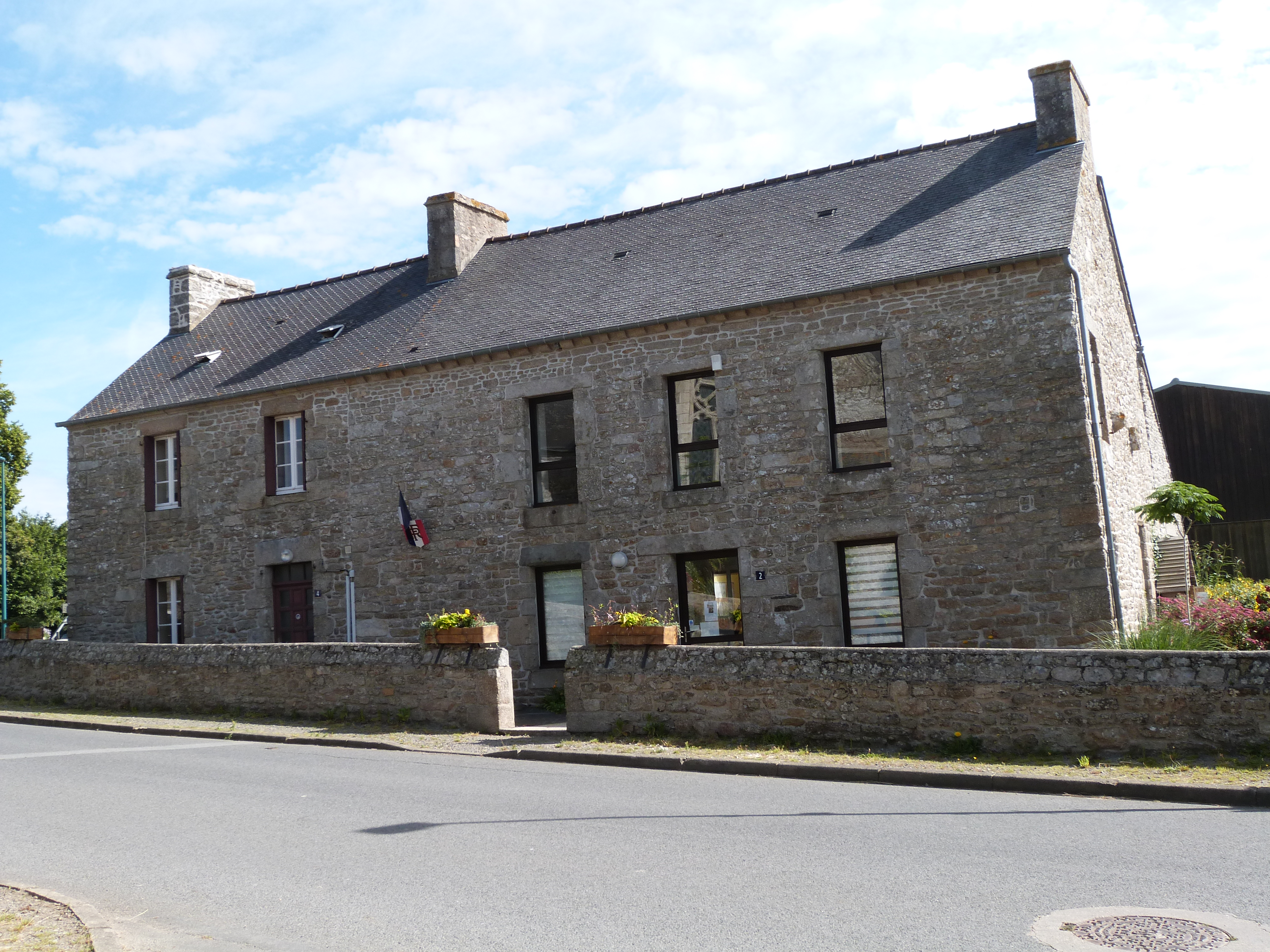 Mairie de Saint-Glen